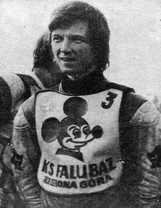 Paweł Protasiewicz - żużlowiec klubu Falubaz(Zgrzeblarki) Zielona Góra 1967-77.